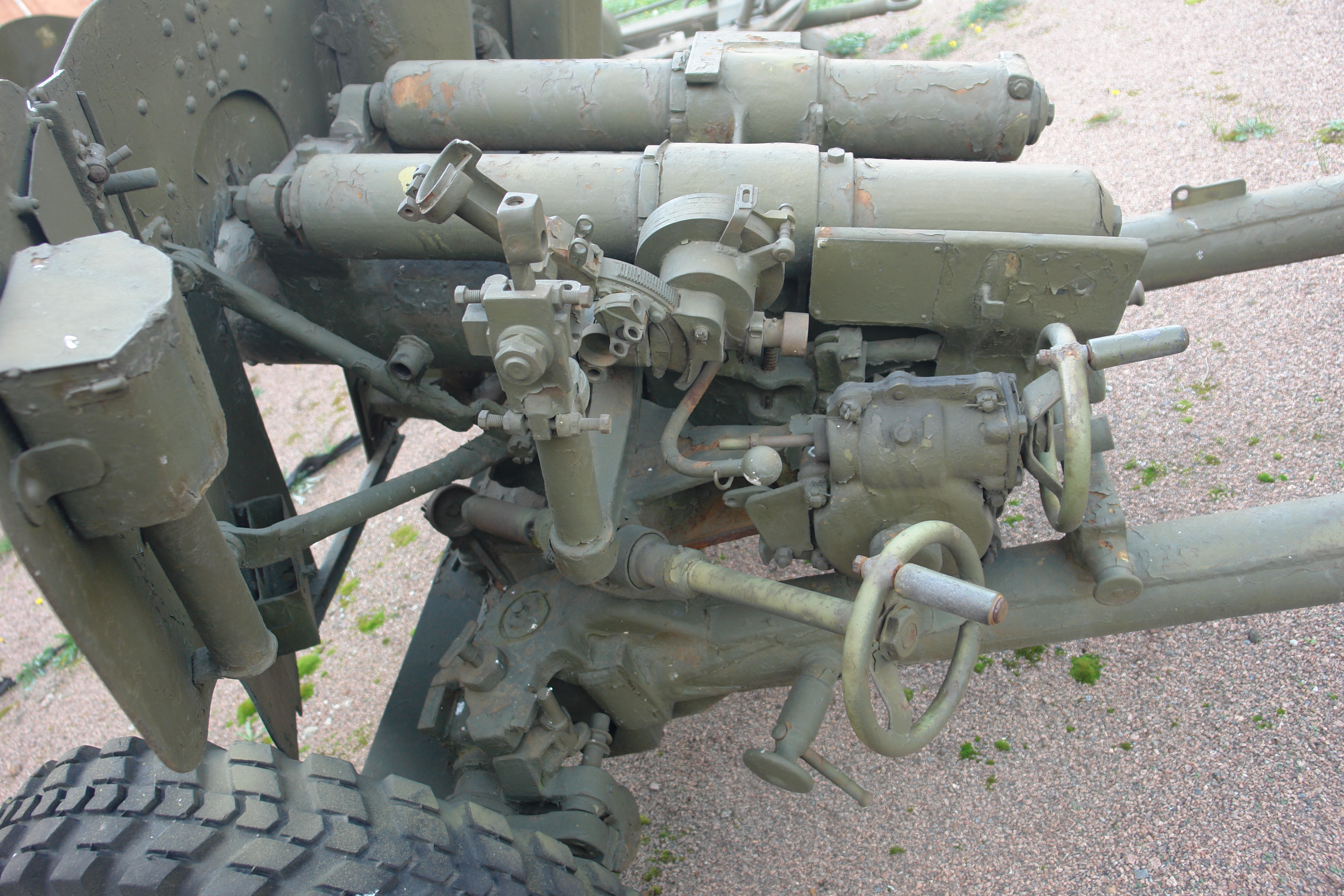 85-мм ДИВИЗИОННАЯ ПУШКА Д-44 ПРИНЯТА НА ВООРУЖЕНИЕ В 1946 г. ГЛАВНЫЙ КОНСТРУ^ОР Ф.Ф.ПЕТРОВ. ДАЛЬНОСТЬ СТРЕЛЬБЫ-15650 м. СКОРОСТРЕЛЬНОСТЬ - 15-20 ВЫСТР/МИН. МАССА, КГ: ОРУДИЯ-1725 СНАРЯДА-9,5. Военно-исторический музей артиллерии, инженерных войск и войск связи, Санкт-Петербург.